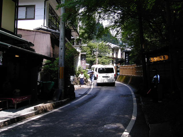 貴船の川床(右側)と料亭(左側)の間を抜ける京都府道361号上黒田貴船線。この狭さでも対面通行で、夏場の観光シーズンには歩行者も道に溢れ出し大渋滞を引き起こす。